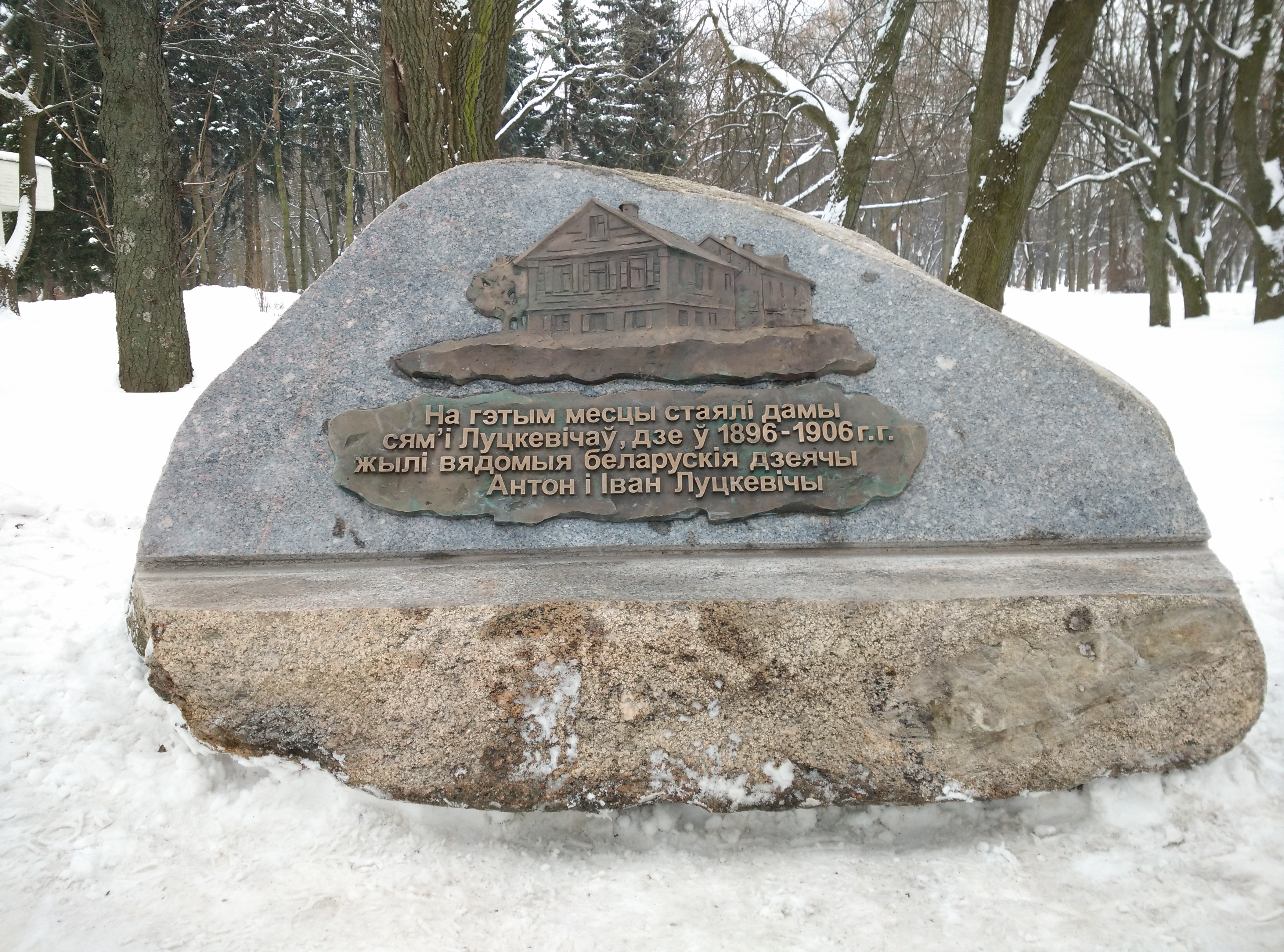 Менск, памятны знак братам Луцкевічам.